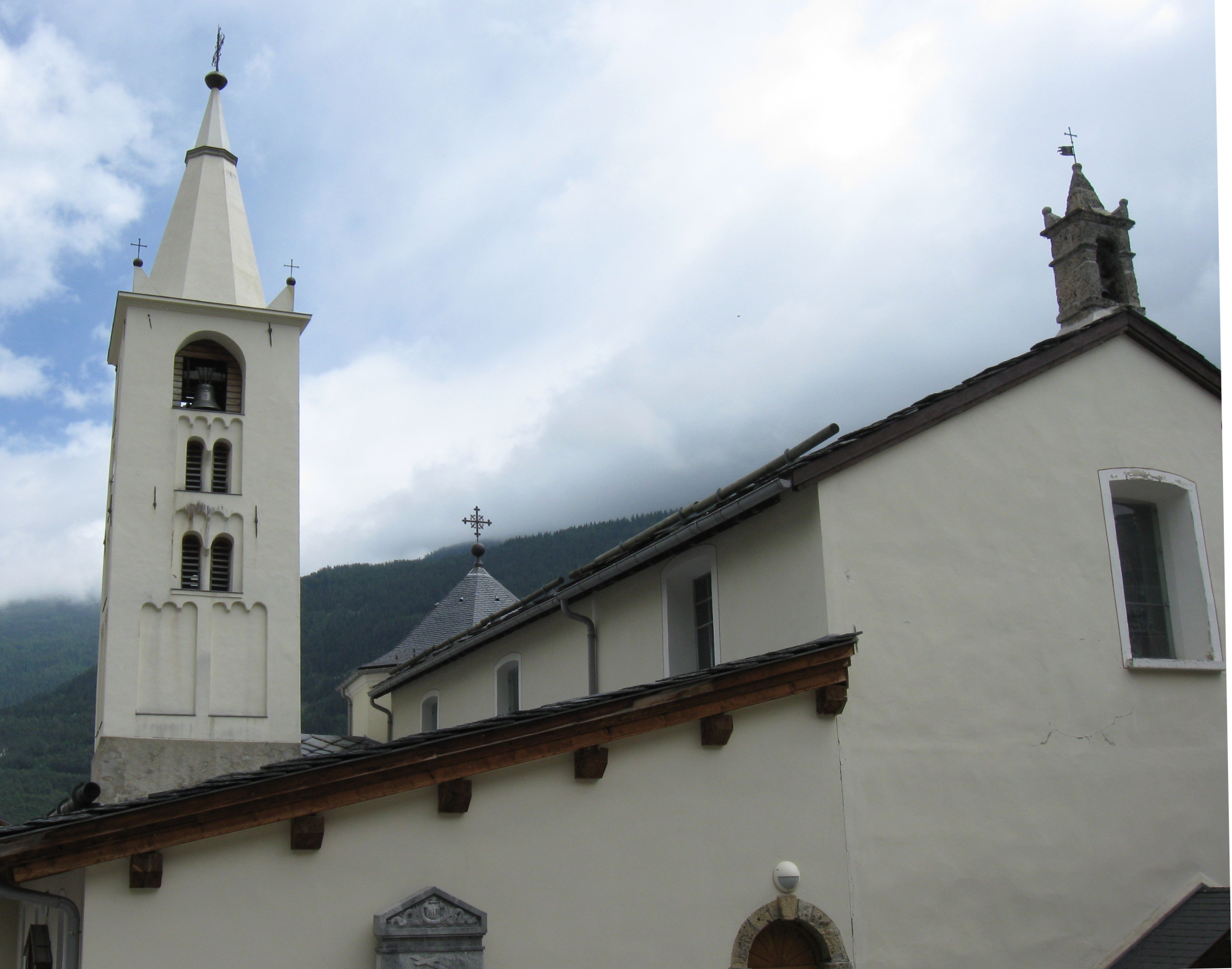 Église Saint-Pierre de Villarodin-Bourget. (Le Bourget, Savoie, Rhône-Alpes).